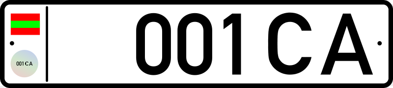 Номерной знак госструктур ПМР (спецномер)